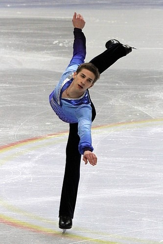 Тимоти Доленски (США) на чемпионате мира по фигурному катанию среди юниоров 2012